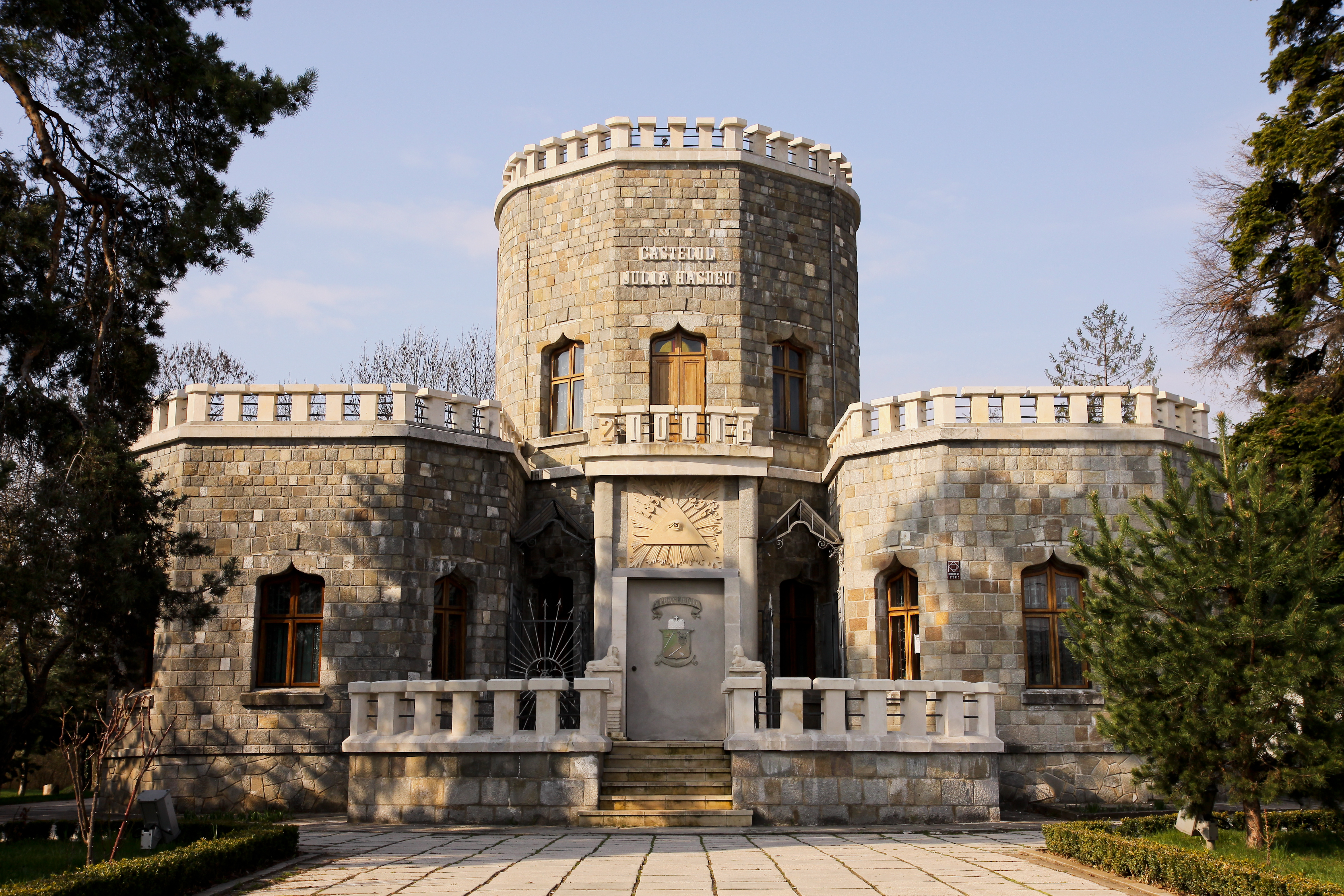 Iulia Hasdeu Castle